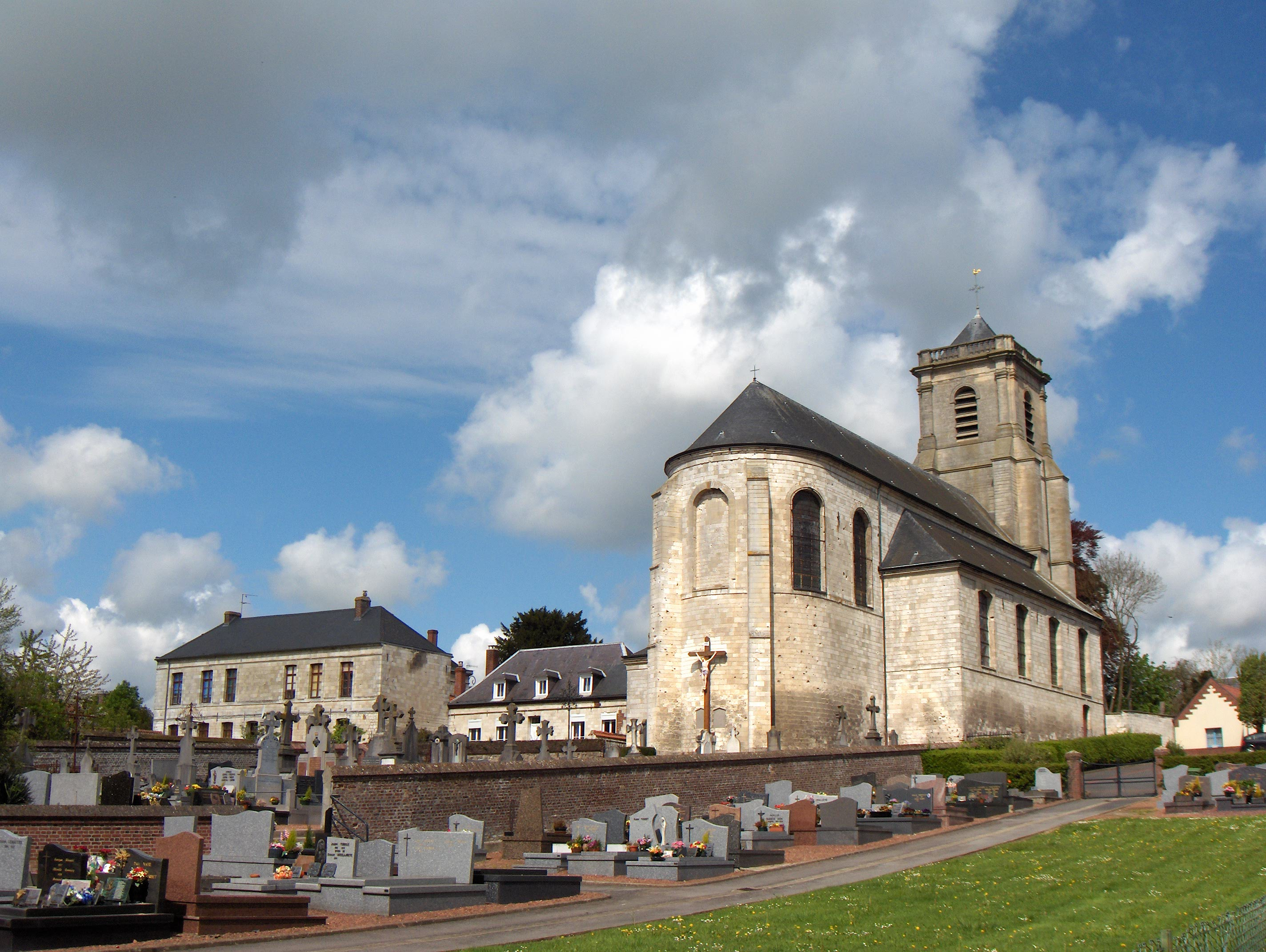 Rivière (dépt. Pas-de-Calais, France), église Saint-Vaast (XVIIIe siècle)